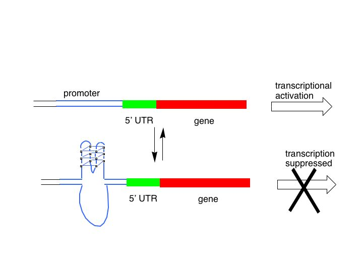 Model for G-quadruplex mediated gene regulation